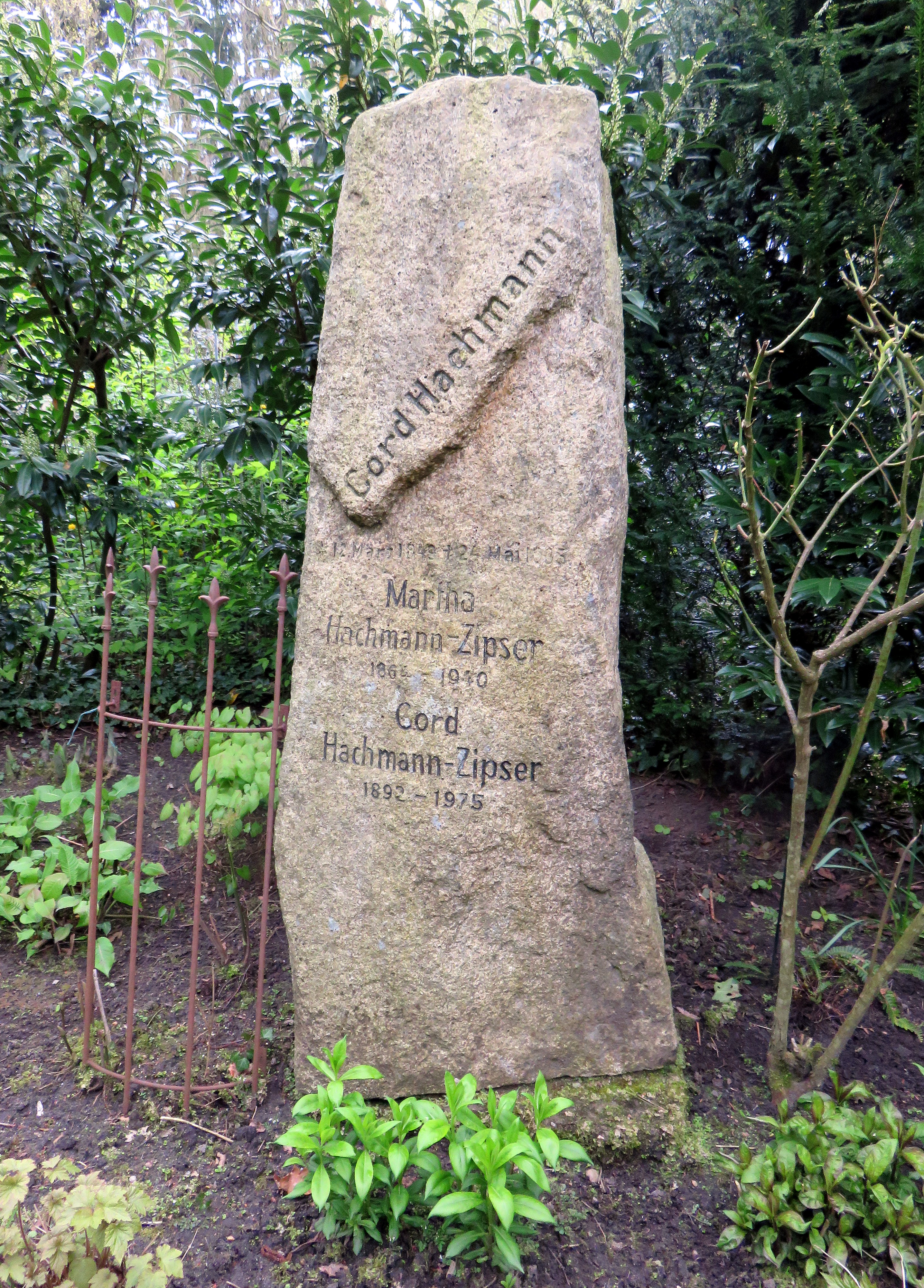 Historischer Grabstein der deutschen Schauspielerin Martha Hachmann-Zipser im Bereich des Gartens der Frauen auf dem Ohlsdorfer Friedhof in Hamburg-Ohlsdorf.Ursprünglicher Standort: Planquadrat X 27 (nahe Kapellenstraße/Grabmalmuseum Ämtersteine) bei Hans-Günther Freitag: Von Mönckeberg bis Hagenbeck: ein Wegweiser zu denkwürdigen Grabstätten auf dem Ohlsdorfer Friedhof, Hansa-Verlag, Hamburg 1973, Seite 125.